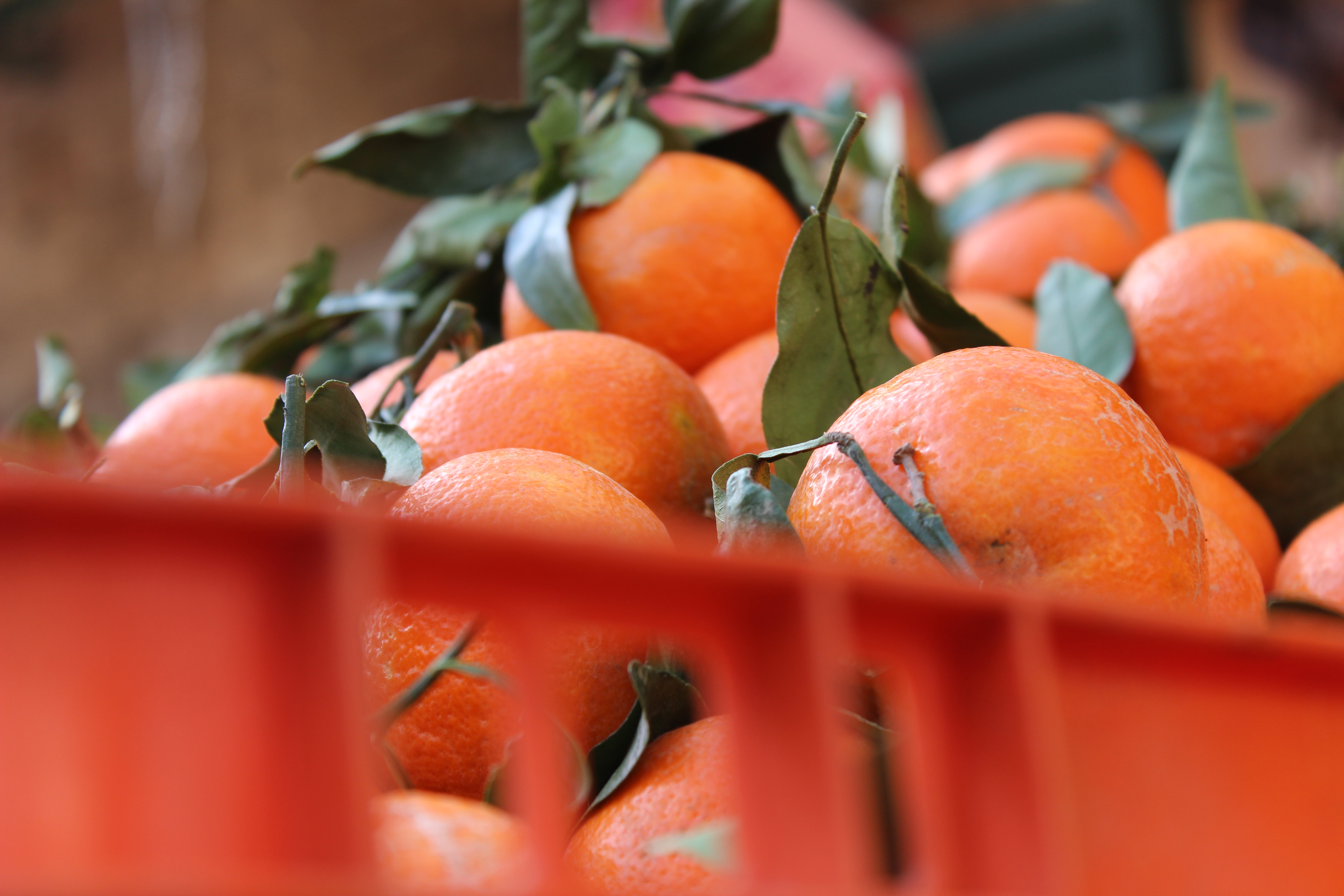 צילום של קלמנטינה בשוק נצרת בינואר 2017